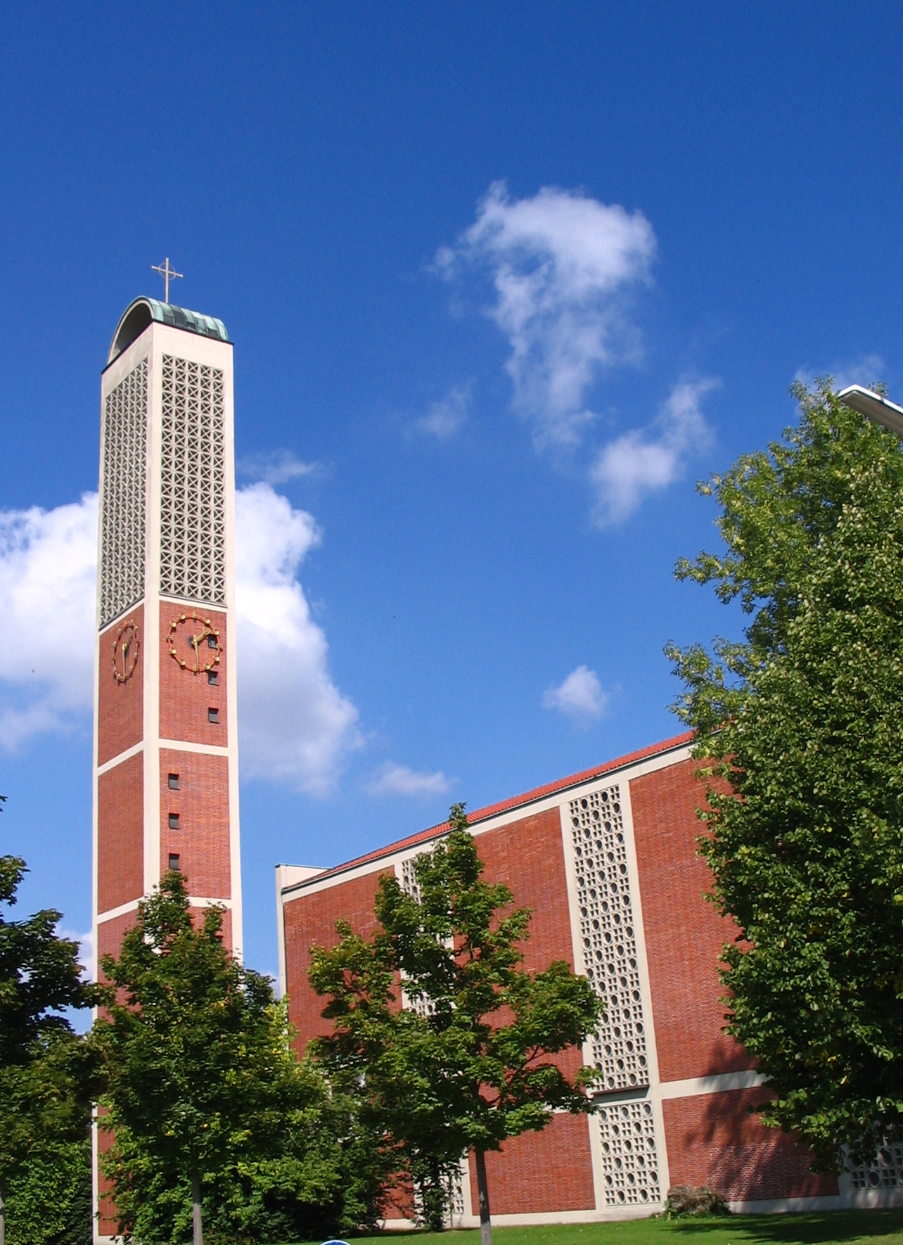 Kath Pfarrkirche in Saal an der Donau, Landkreis Kelheim, Niederbayern